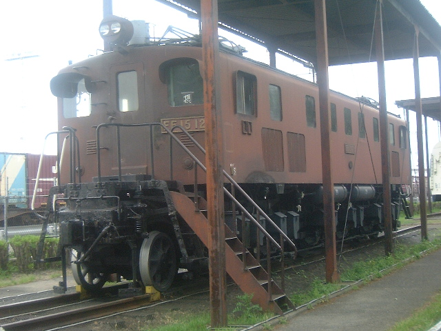 摂津市新幹線公園 EF15 120